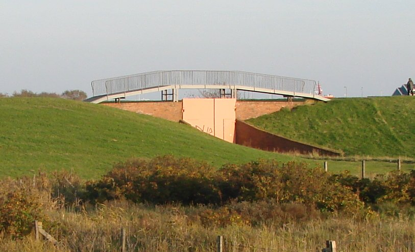 Deichschart der Inselbahn Spiekeroog